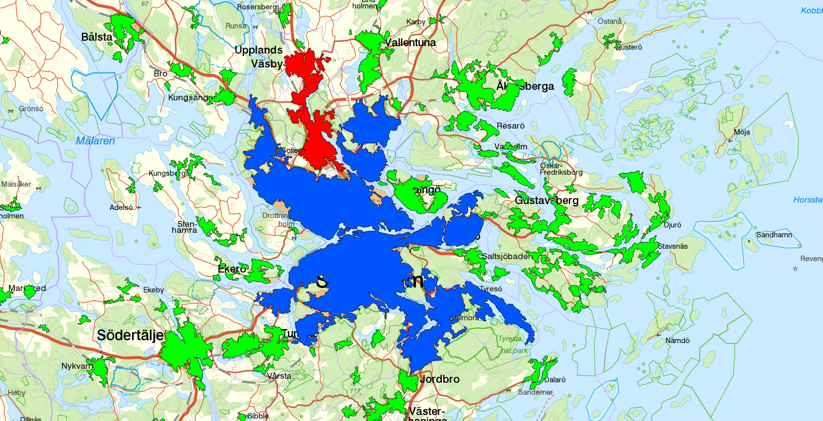 De nya gränserna för tätorterna Stockholm och "Sollentuna och Upplands Väsby" (ny tätort)